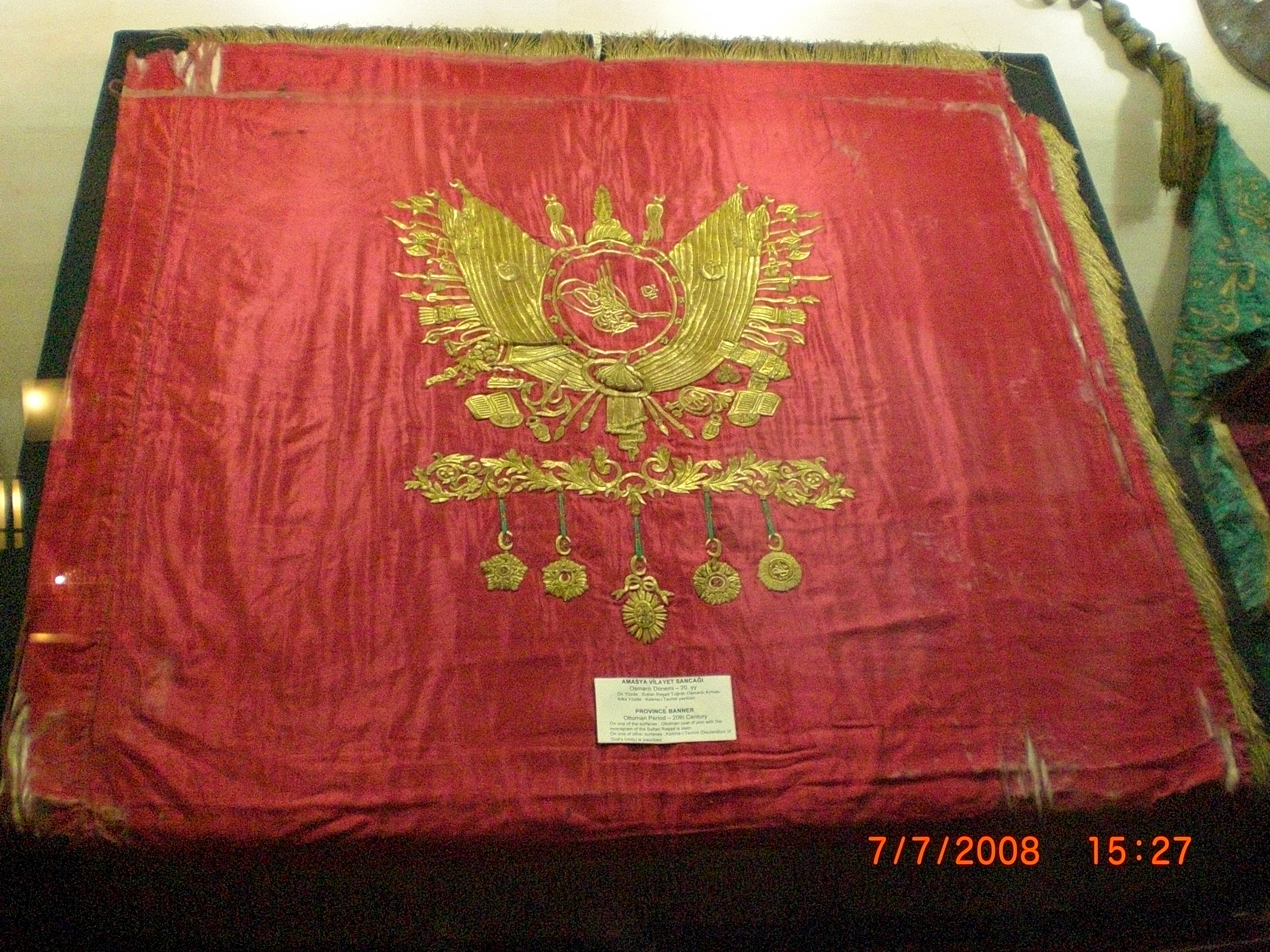 Amasya Vilayet Sancağı